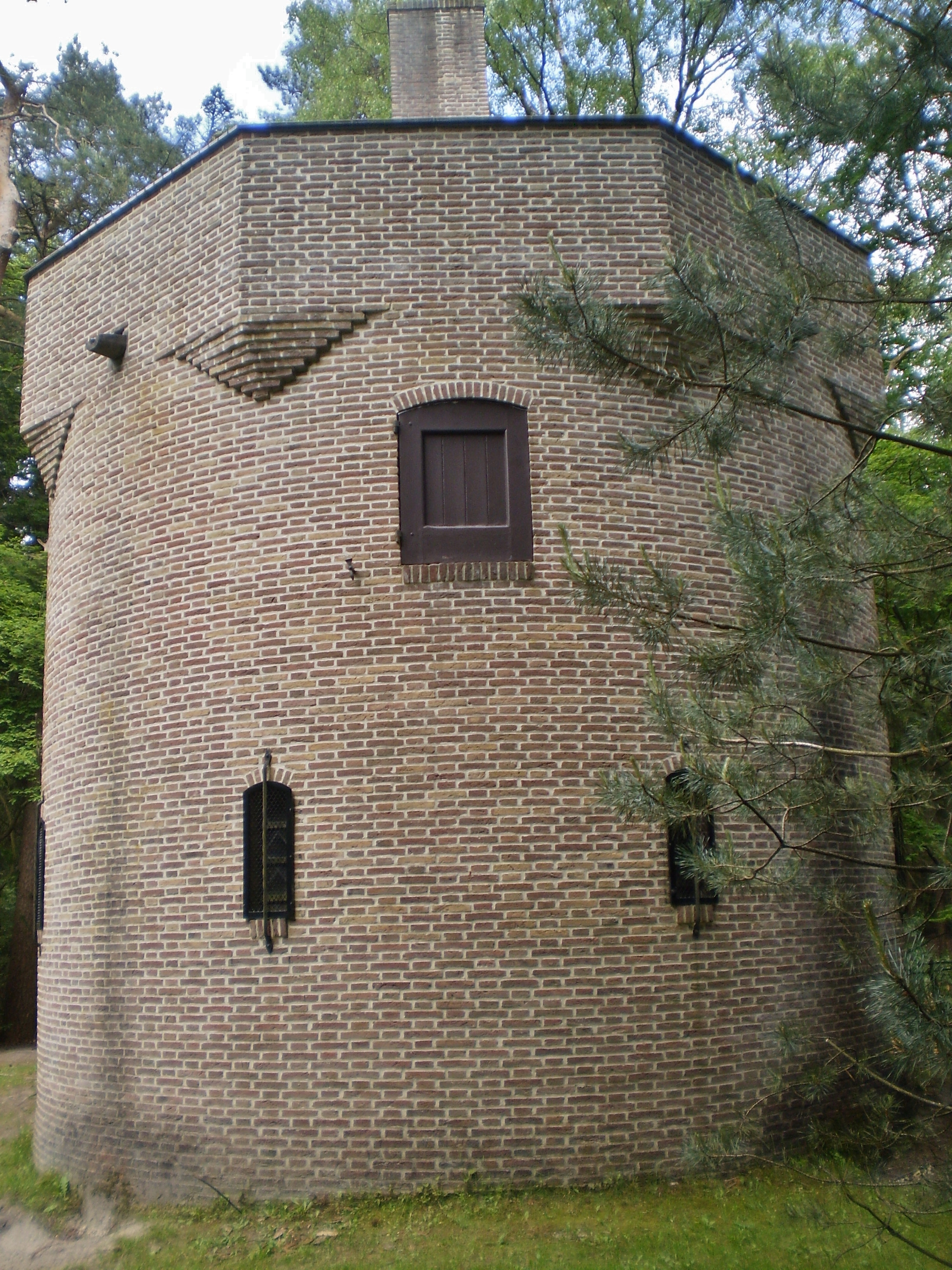 Wolfsdreuvik